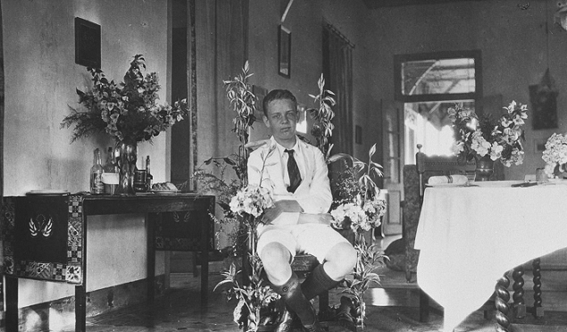 Foto. Portret van een jongen op zijn verjaardag, Tjitjoeroeg